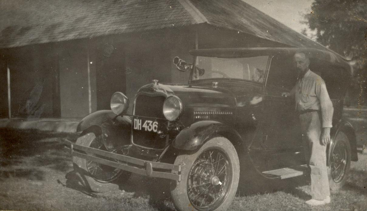 Foto uit familiealbum van ds Van Dijk. Voordat ds Van Dijk deze auto vanuit de kerk Nederland kreeg moest hij de dorpen per paard bezoeken. Een reis duurde dan al snel een week.